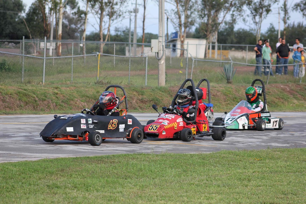 4ta fecha del campeonato nacional México 2012 en el autodromo de León Guanjuato